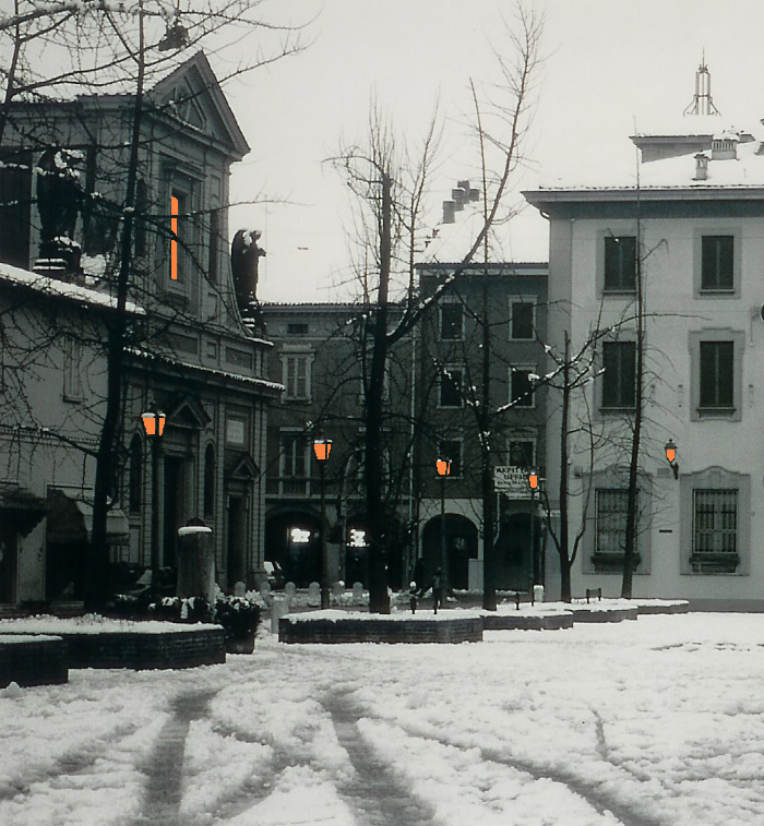 Chiesa di Santa Maria Assunta presa da Piazza Garibaldi a Castelfranco Emilia